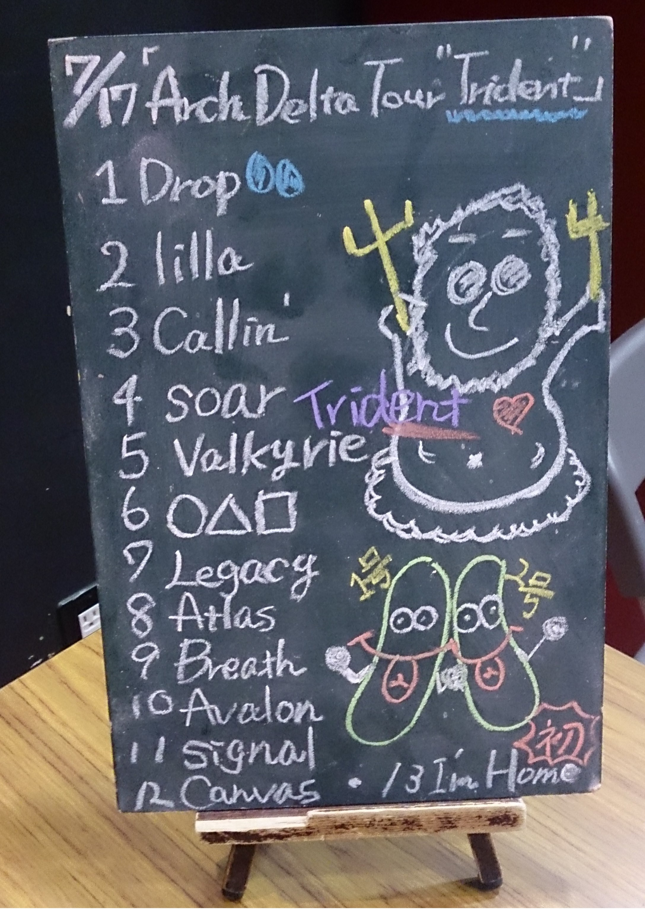 amiinAセトリボード(20170717(1))